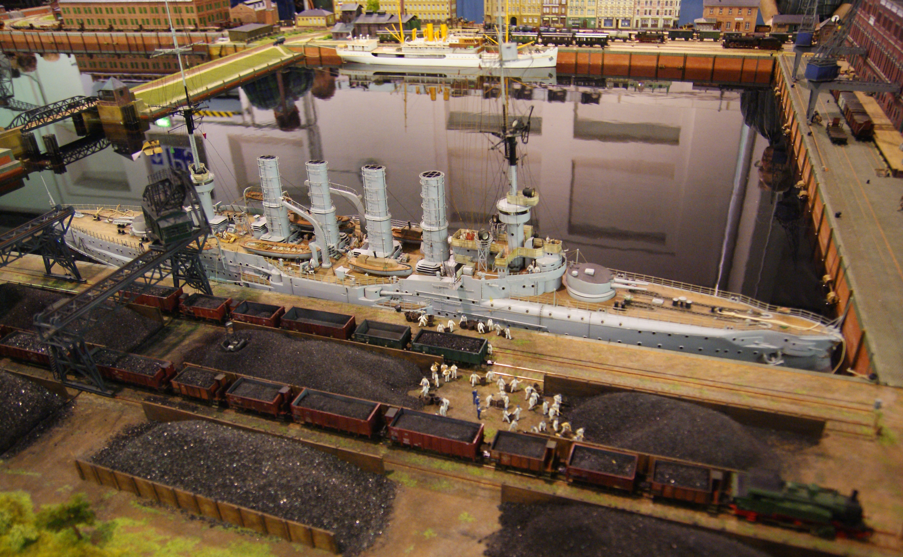 Modellbahnausstellung Dresden, IG Kaiserliche Marine, Modell der Scharnhorst-Klasse